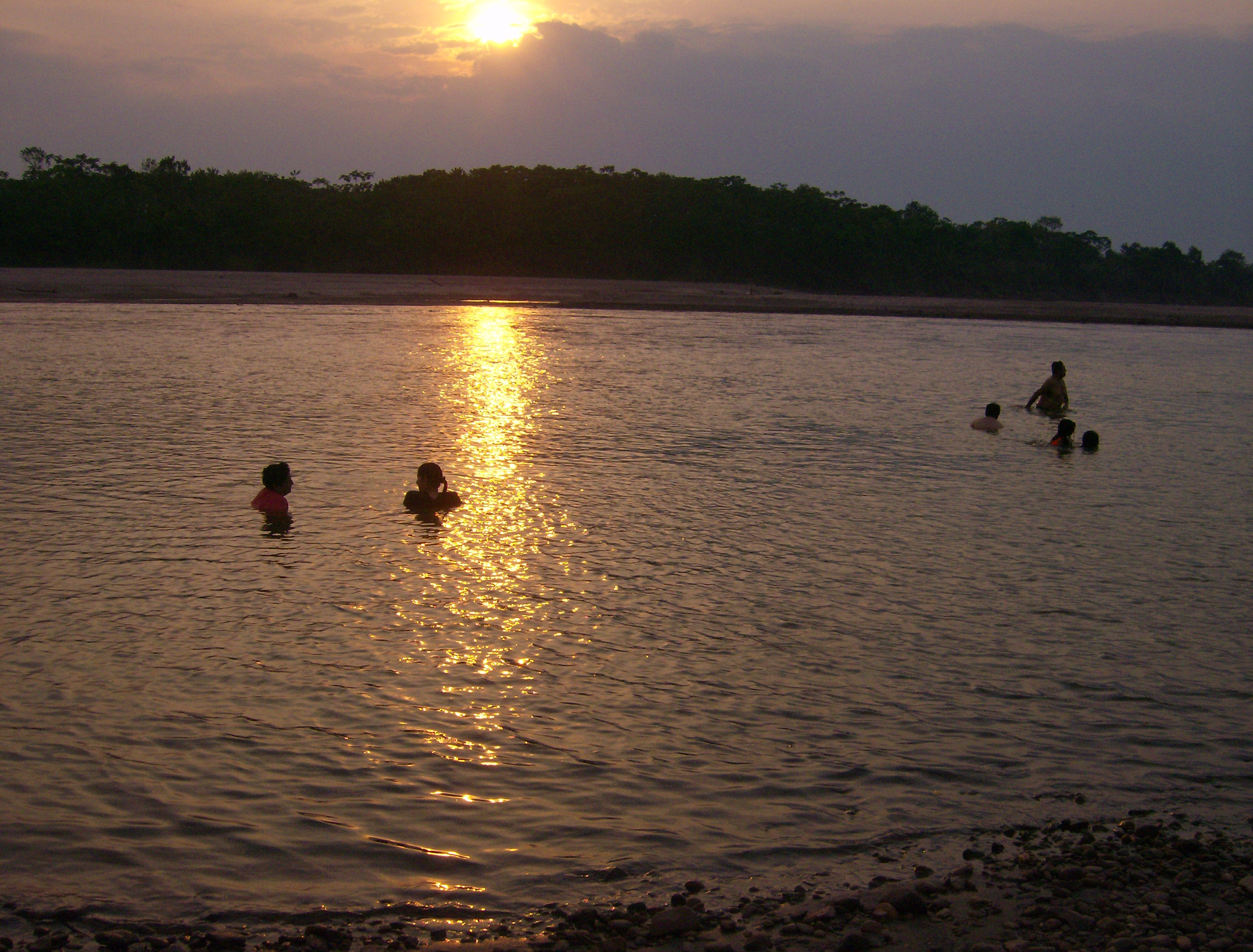 Foto Rio Putumayo